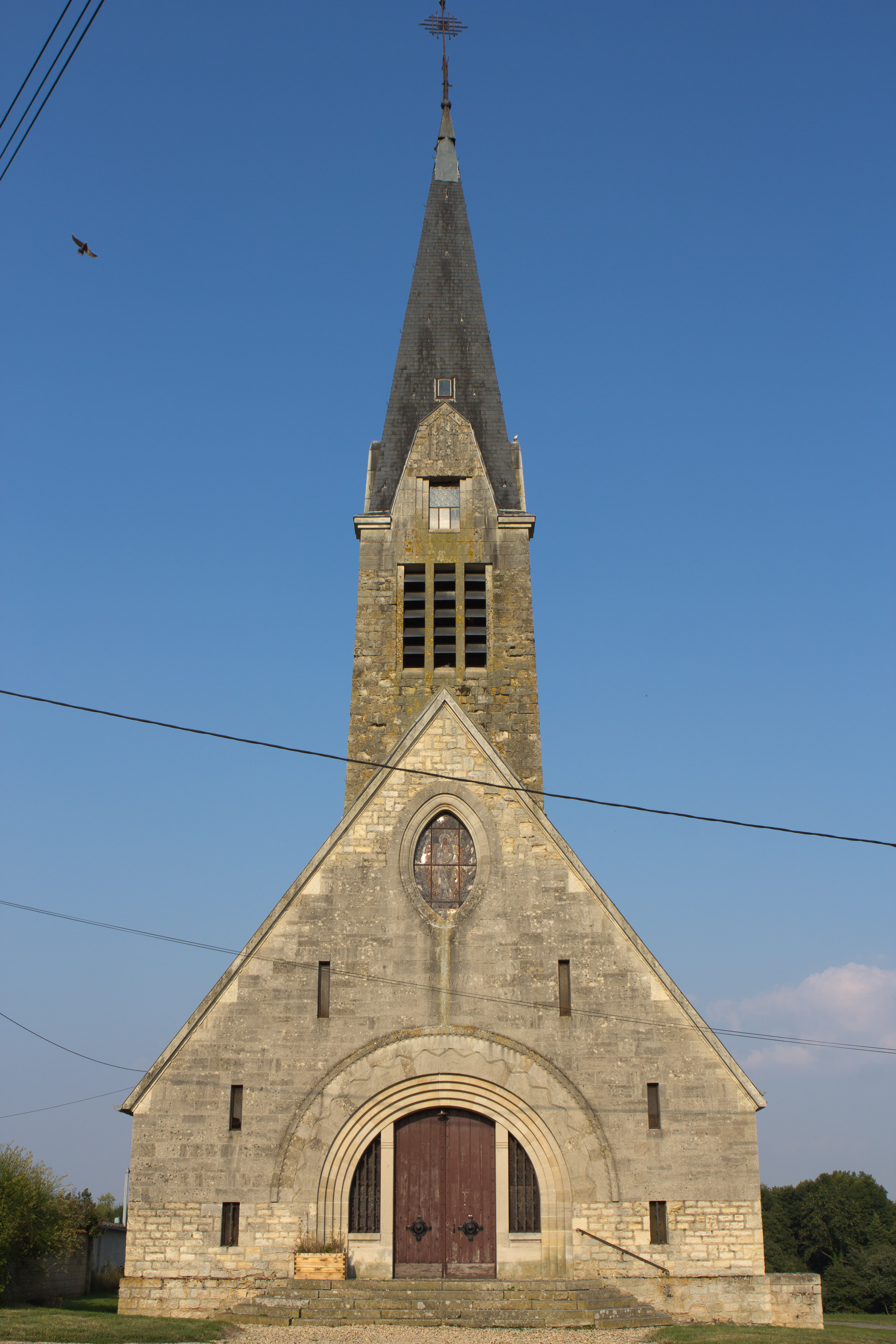 Église Saint-Martin de Craonne / Craonne, Aisne, France